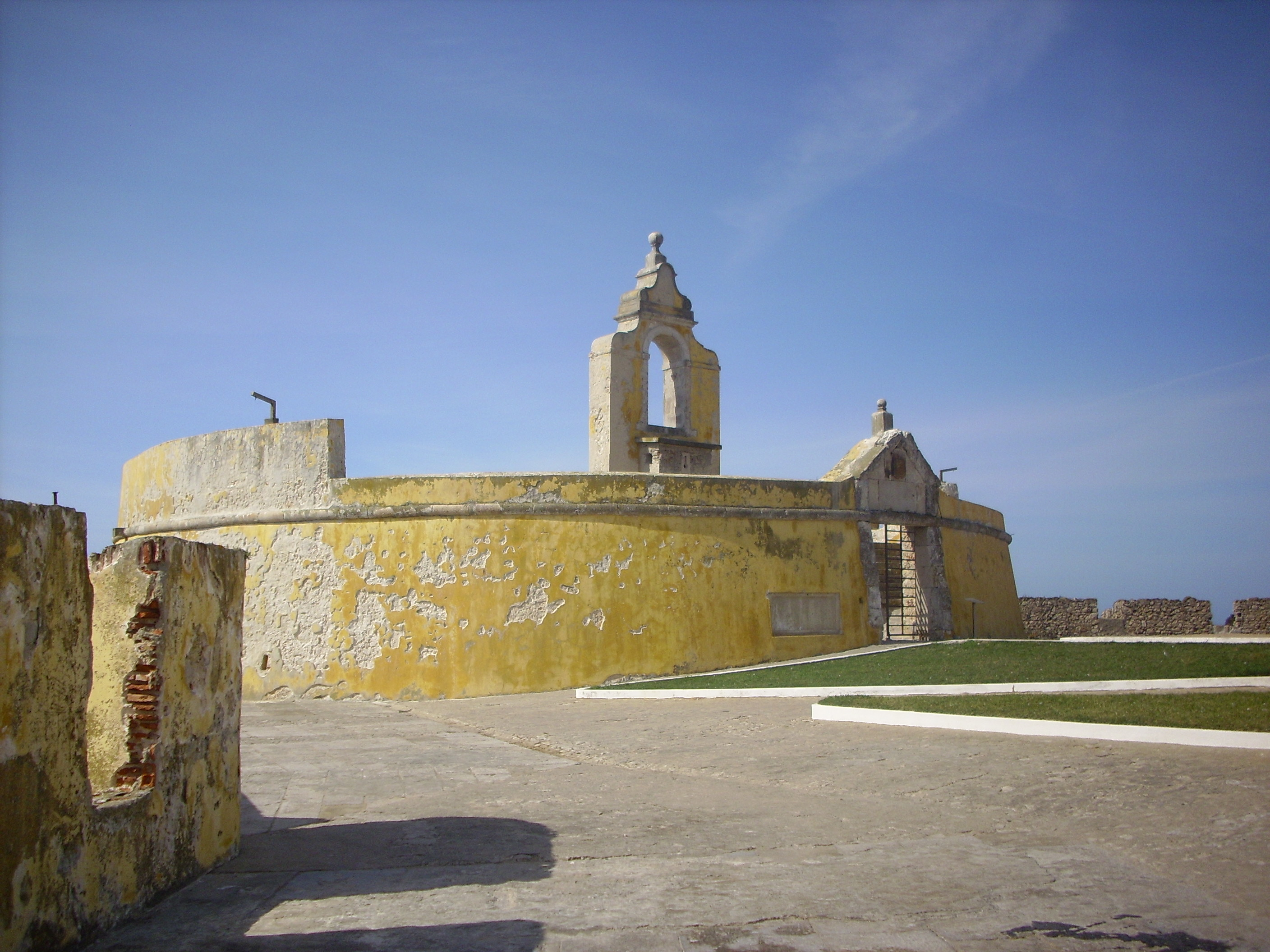 Peniche